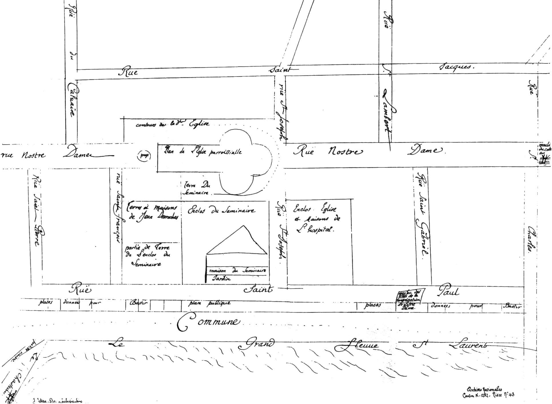 Plan des rues de Ville-Marie en 1672 par François Dollier de Casson, supérieur des Sulpiciens, seigneurs de l'île de Montréal. Il fit ce plan avec l'aide de Bénigne Basset Des Lauriers, notaire et arpenteur.